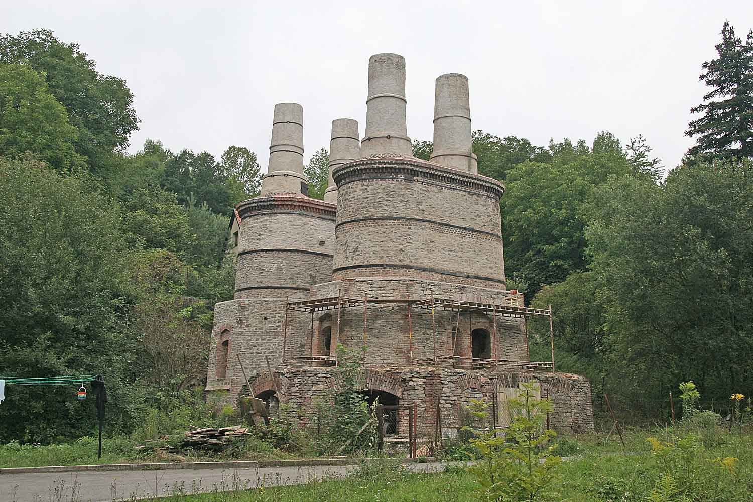 Vápenka ve Velké Chuchli, Praha, Česká republika - Google Maps - Google Earth